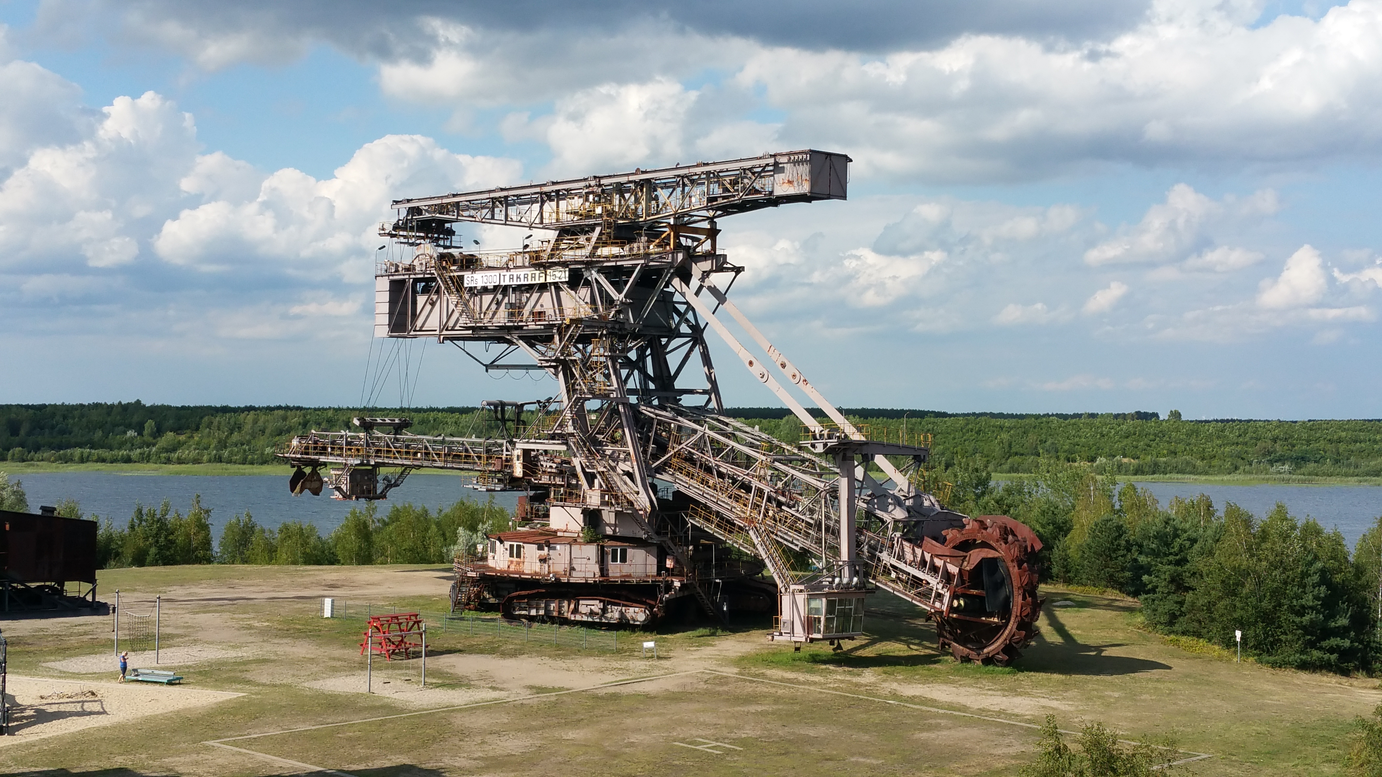 Ein ausgedienter Schauffelradbagger in Ferropolis.